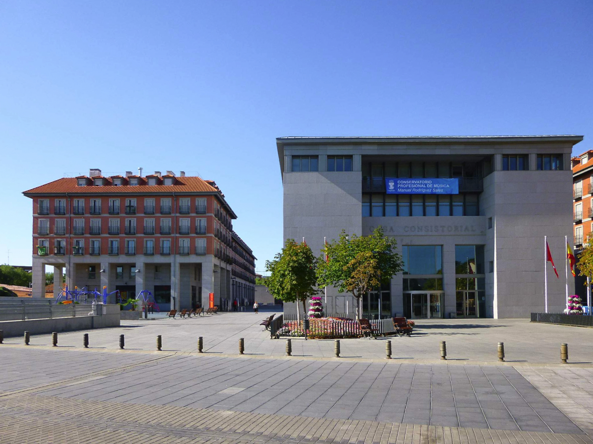 Ayuntamiento de Leganés (Madrid)